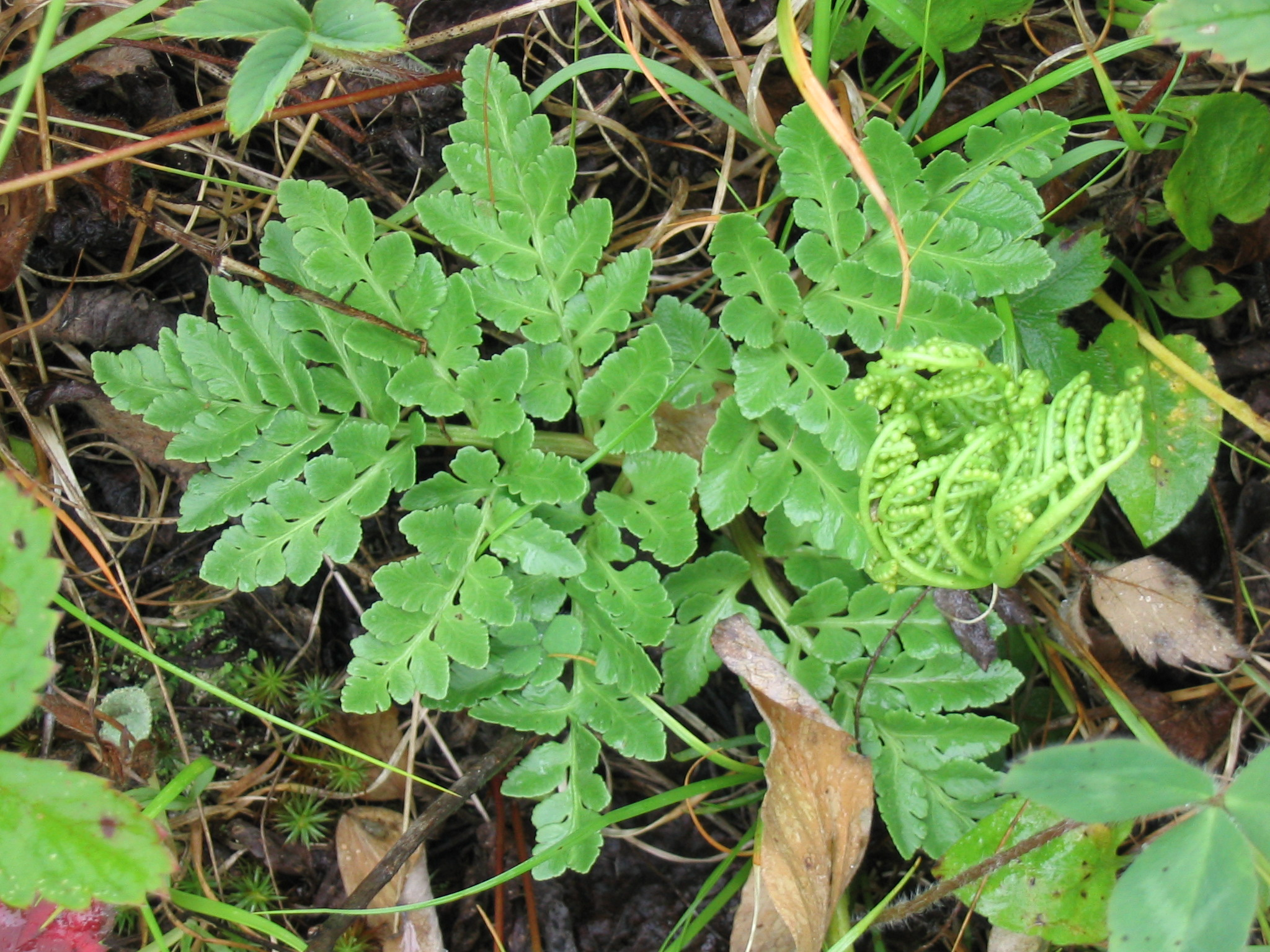 Botrychium multifidum 1-eheep